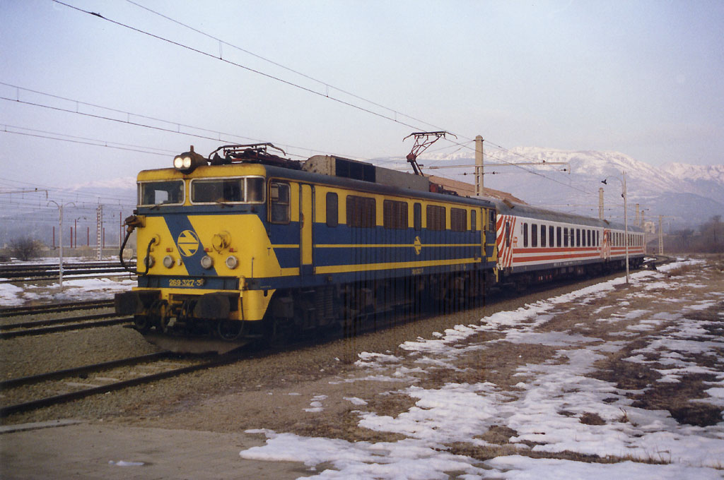 Locomotora 269.327 amb el tren Pullman Cerdanya, entrant a Puigcerdà (Baixa Cerdanya, província de Girona).